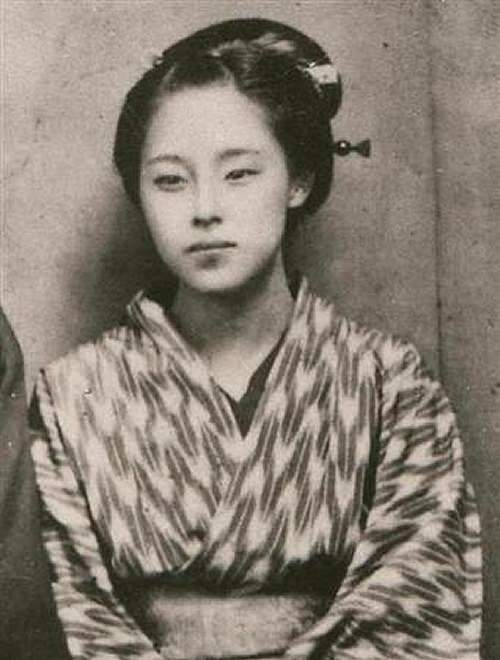 楠本高子（1872年、大阪の心斎橋の写真館にて撮影、カラス版湿板写真）